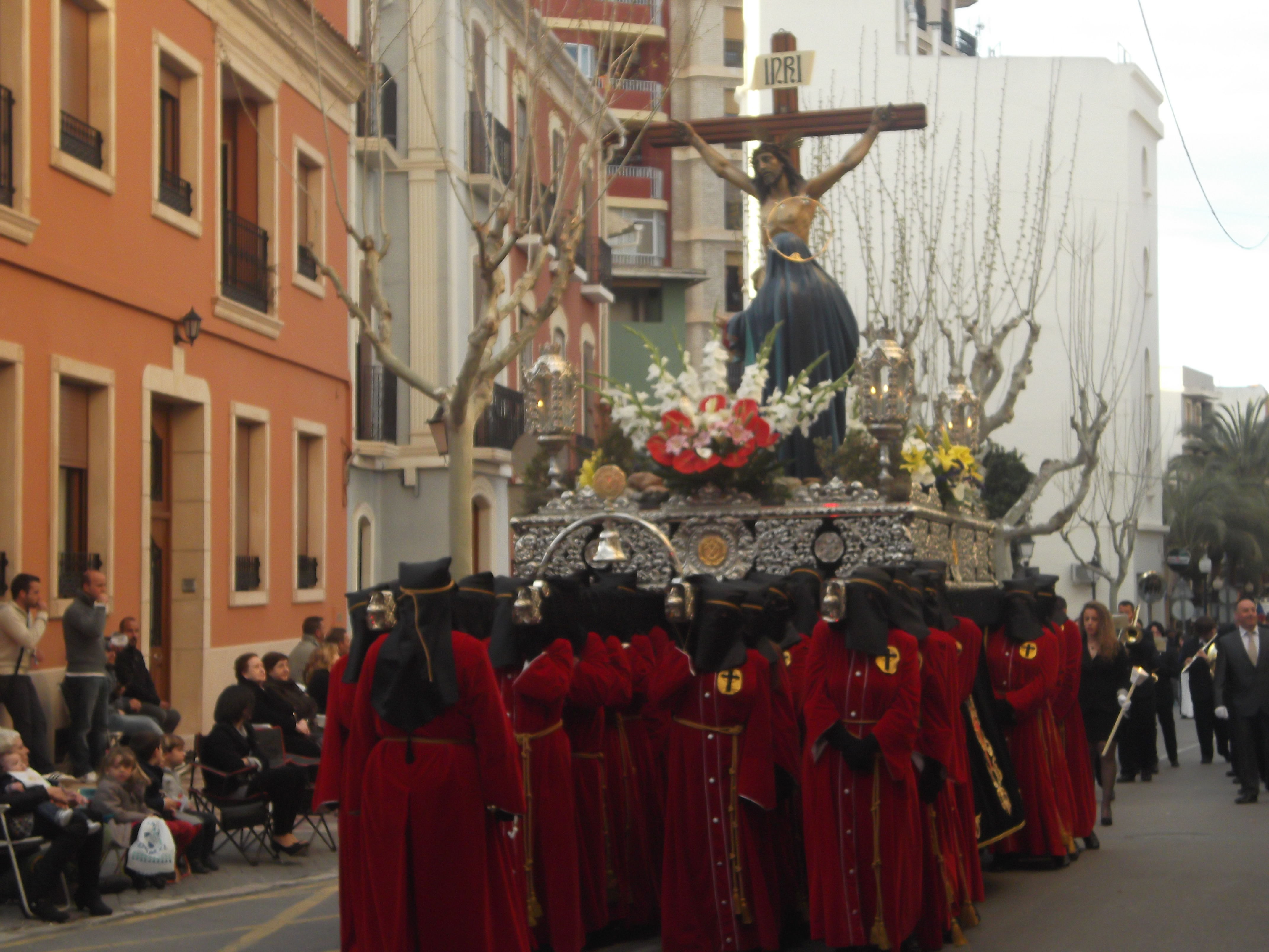 Paso Madre Desolada, de la Semana Santa de Aspe.